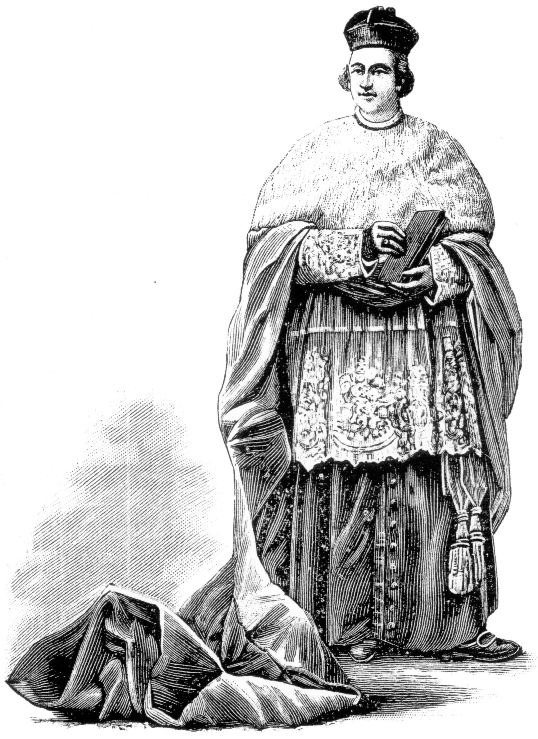 Évêque avec la cappa relevée